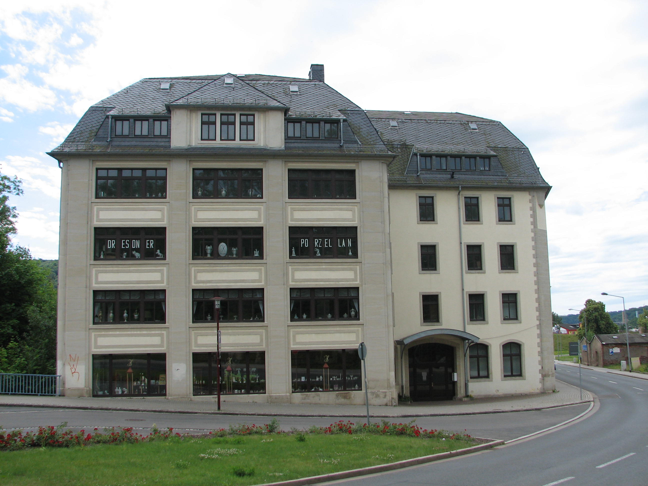 Das Werksgebäude der "Porzelline" in Freital-Potschappel.